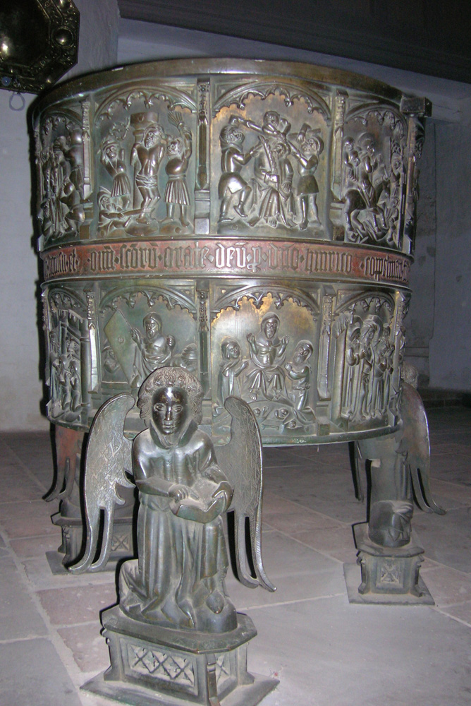 Bronzener Taufkessel der Stadtkirche Gadebusch